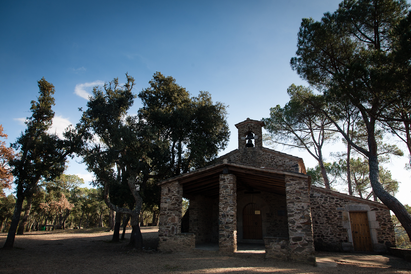 Petita església situada al mig del bosc, d'origen romànic amb planta rectangular i absis semicircular una mica apuntat, recordant la forma de la quilla dels vaixells. Parets de pedra morterada, coberta de teula amb encavallades de roure. Campanar d'espadanya i un cobert a l'exterior. La reconstrucció acabada l'any 1981 ha variat alguns aspectes originaris enrunada per l'actual coberta amb encavallades i l'afegit del campanar d'espadanya que inicialment no existia.